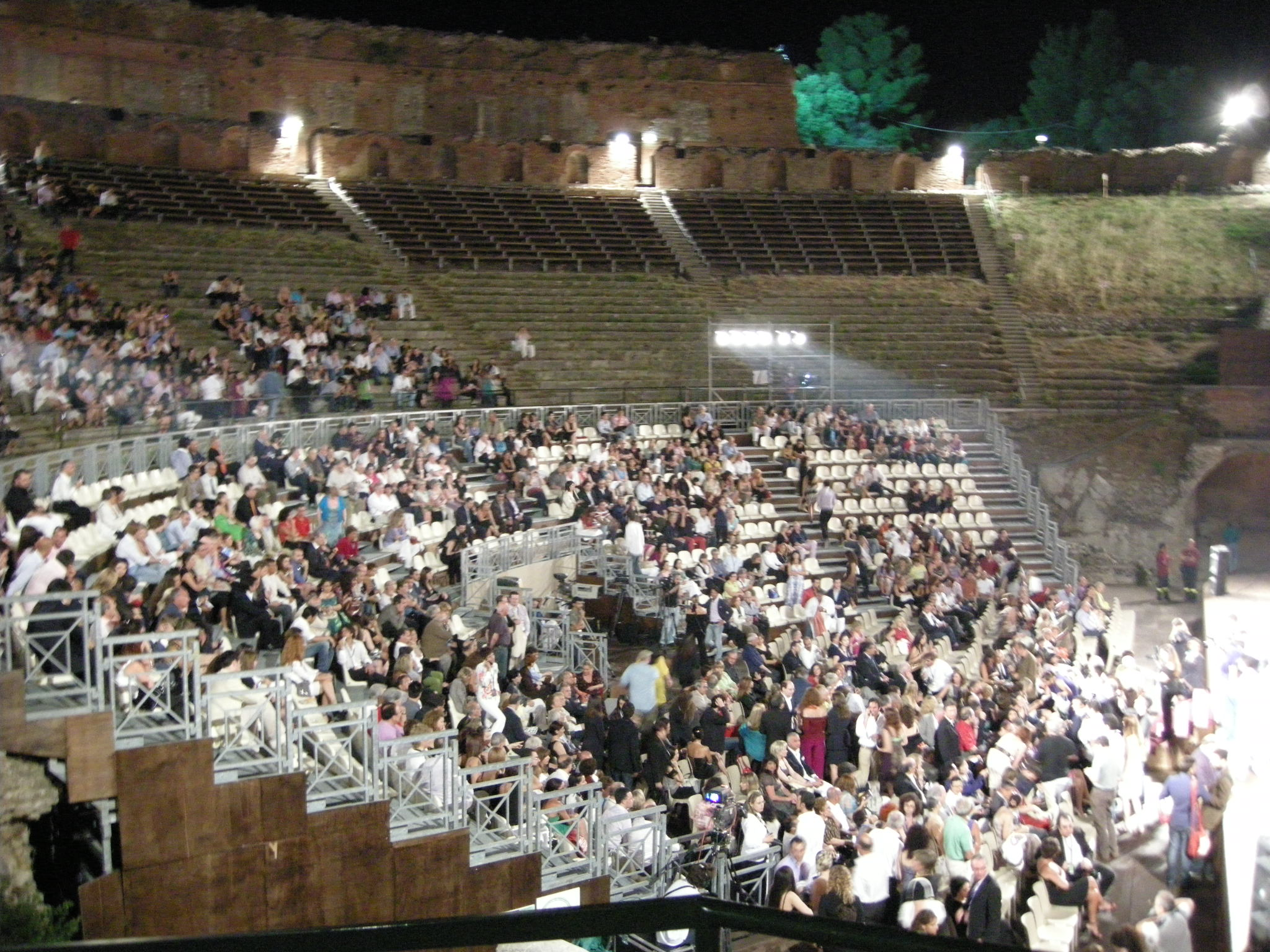 Taormina, teatro greco durante taormina film festival